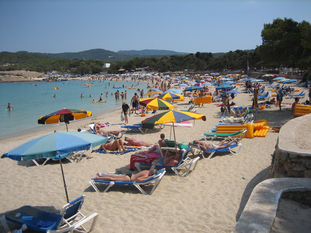 Vista de Cala Bassa, Eivissa